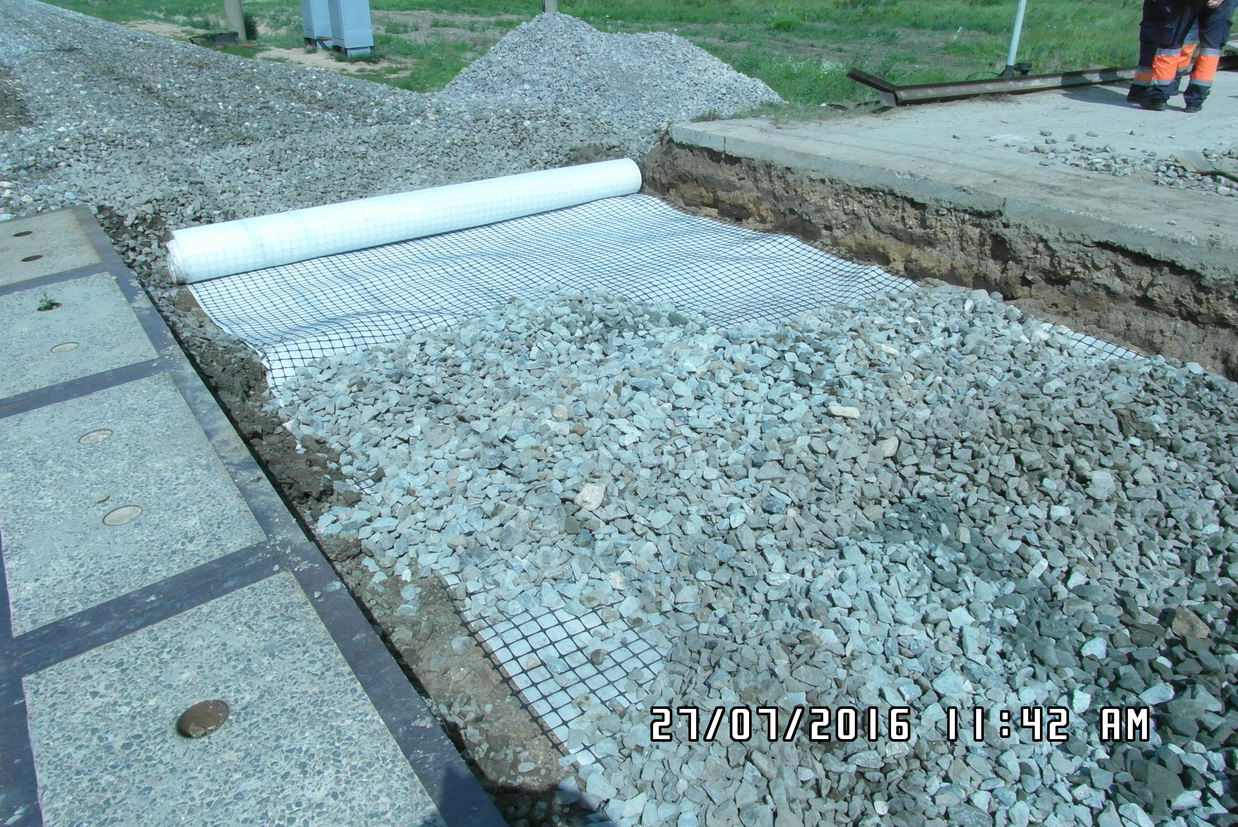 Pārbrauktuves geokompozīts